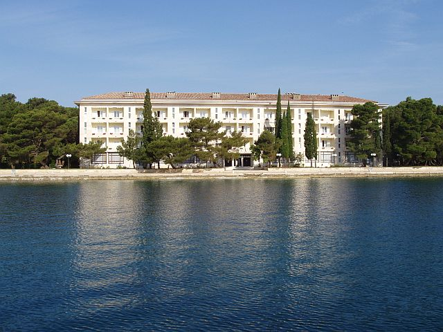 Brijuni, 28. maj 2006.